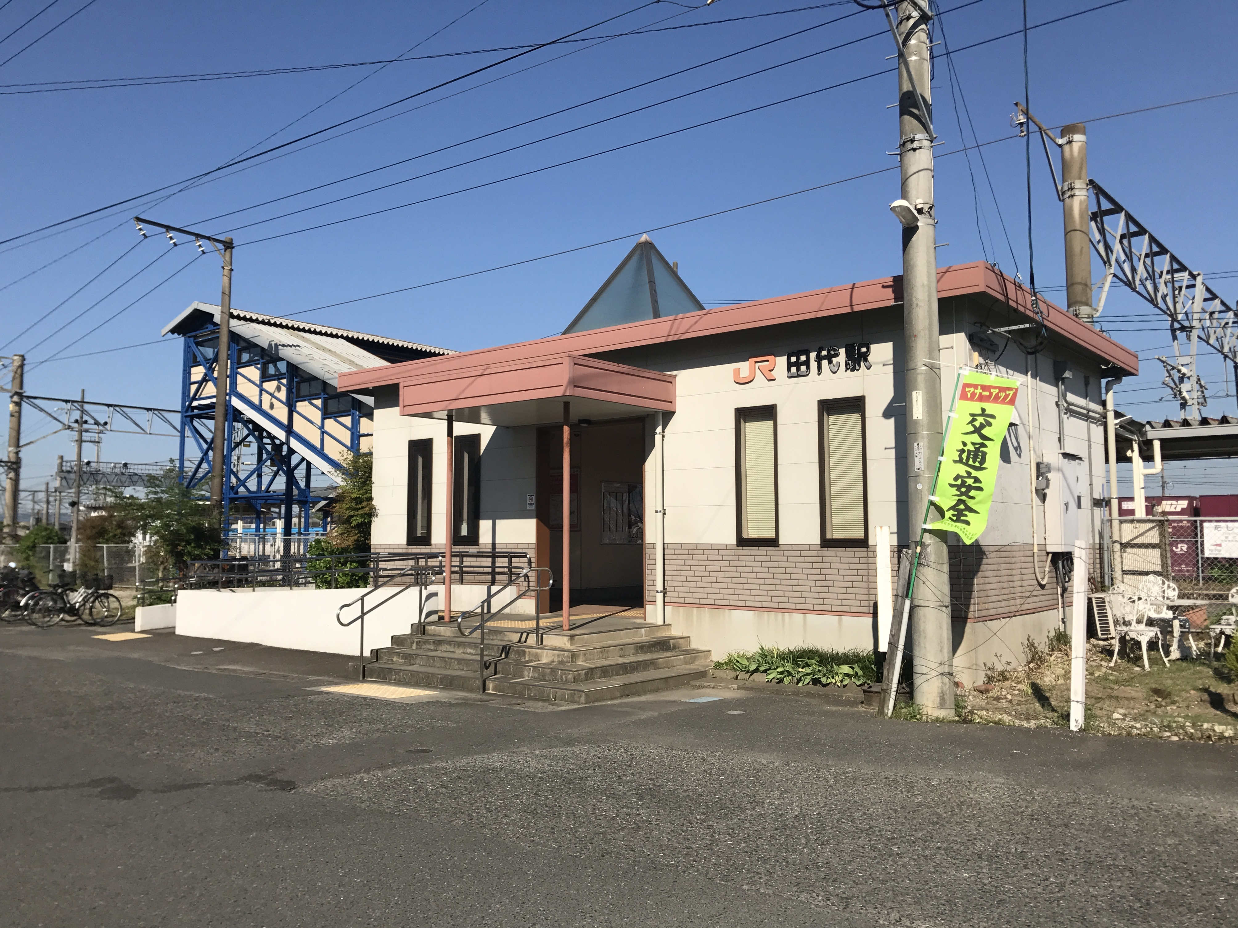 田代駅駅舎